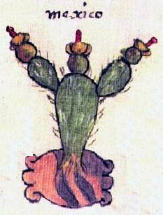 Detail aus dem Codex Osuna das das Symol von Tenochtitlan (Mexico), eine Opuntia, zeigt.